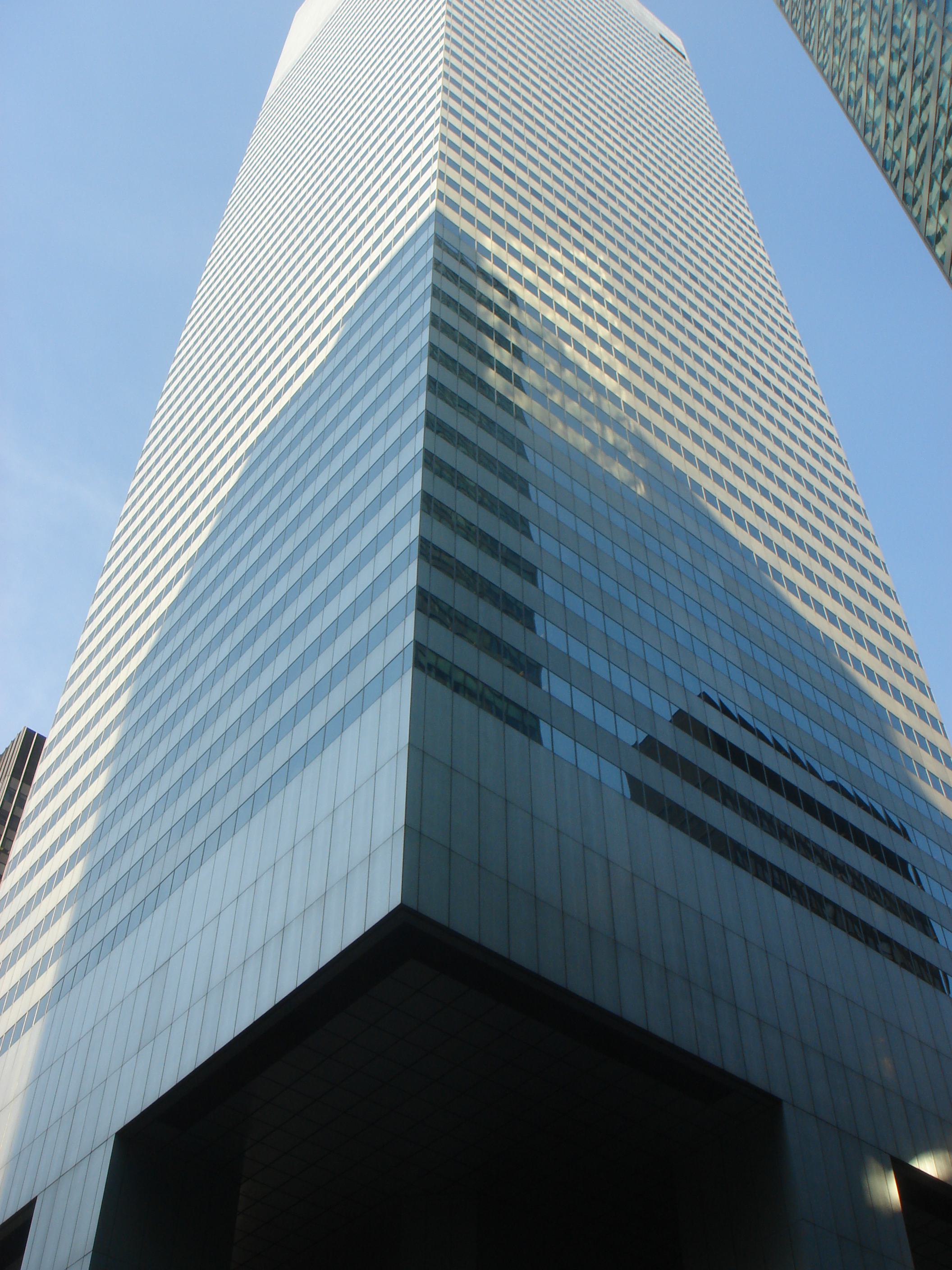 Citigroup Centerздание на 53 улице и Лексингтон